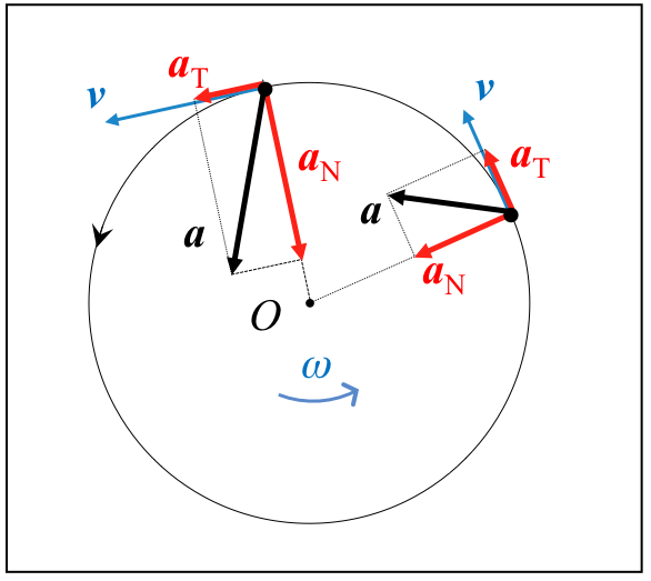 Higidura zirkular ez-uniformean abiaduraren eta azelerazioaren osagaien moduluak aldatuz doaz denboraren funtzioan. Kasu honetan higidura uniformeki azeleratua adierazi da (azelerazio tangentearen modulua konstantea).